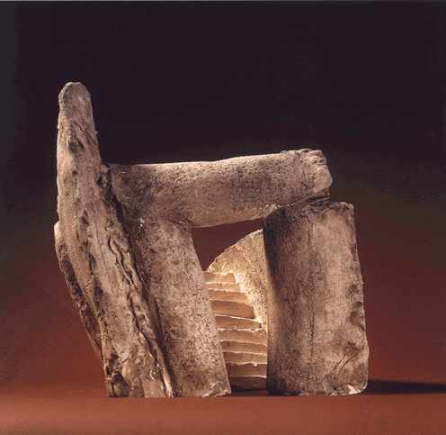 Bildbeschreibung: Hinter einem aus drei mächtigen zylindrischen Säulen gebildeten Tor wird der Blick auf eine emporsteigende Treppe freigegeben, die auf der linken Seite von einer Art Wall, auf der rechten eher von einer kleinen Stützmauer gefasst ist. Optisch geht man geradezu auf ein monumentales Kultensemble wie Stonehenge zu, aber dann kommt der Bruch: Diese Objekt hat eine Höhe von 32 Zentimetern und ist zudem von oben offen. Man kann es sozusagen domestizieren, ganz kühl optisch abgreifen, von oben betrachten, und dann kann man - rein virtuell - auch von oben einsteigen und die Treppe herab schreiten. Die Ambivalenz zwischen imposanter Monumentalität und vertrauter Dimensionalität beherrscht Reutter wie kaum ein zweiter Plastiker, der mit architektonischen Metaphern arbeitet. Dr. Jochen Kronjäger, 2. Direktor der Kunsthalle Mannheim Größe 32 x 30 x29 cm Material Ton engobiert